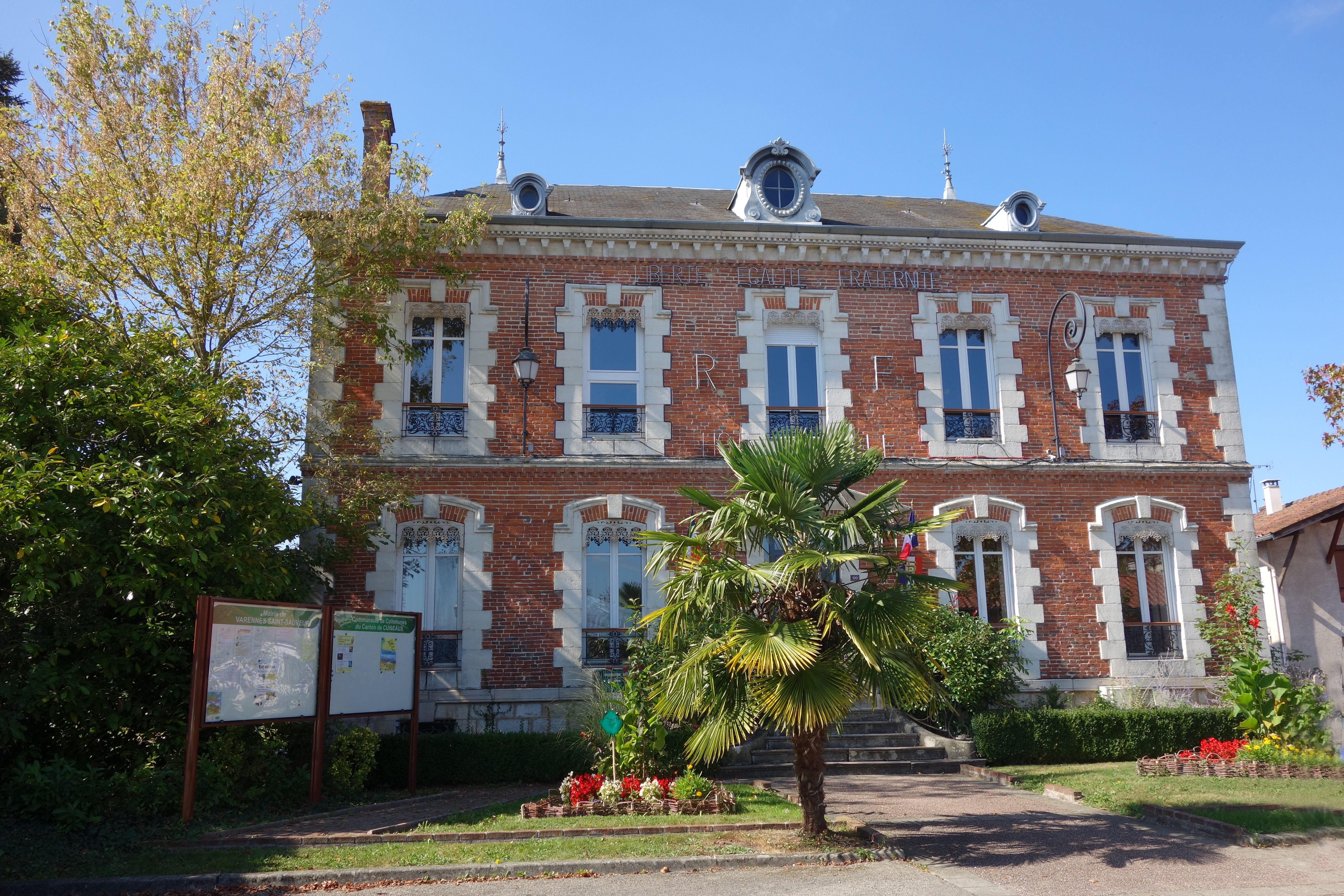 Varennes-Saint-Sauveur (71) Mairie